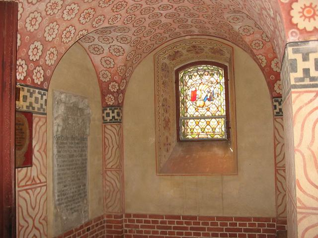 Kirche Gröben, Brandenburg. Vorraum. Vorraum rechts mit Fenster Fischer Gröbener Kietz und Grabplatte von Gustav Albrecht von Schlabrendorf Selbst fotografiert, August 2004 GNU FDL